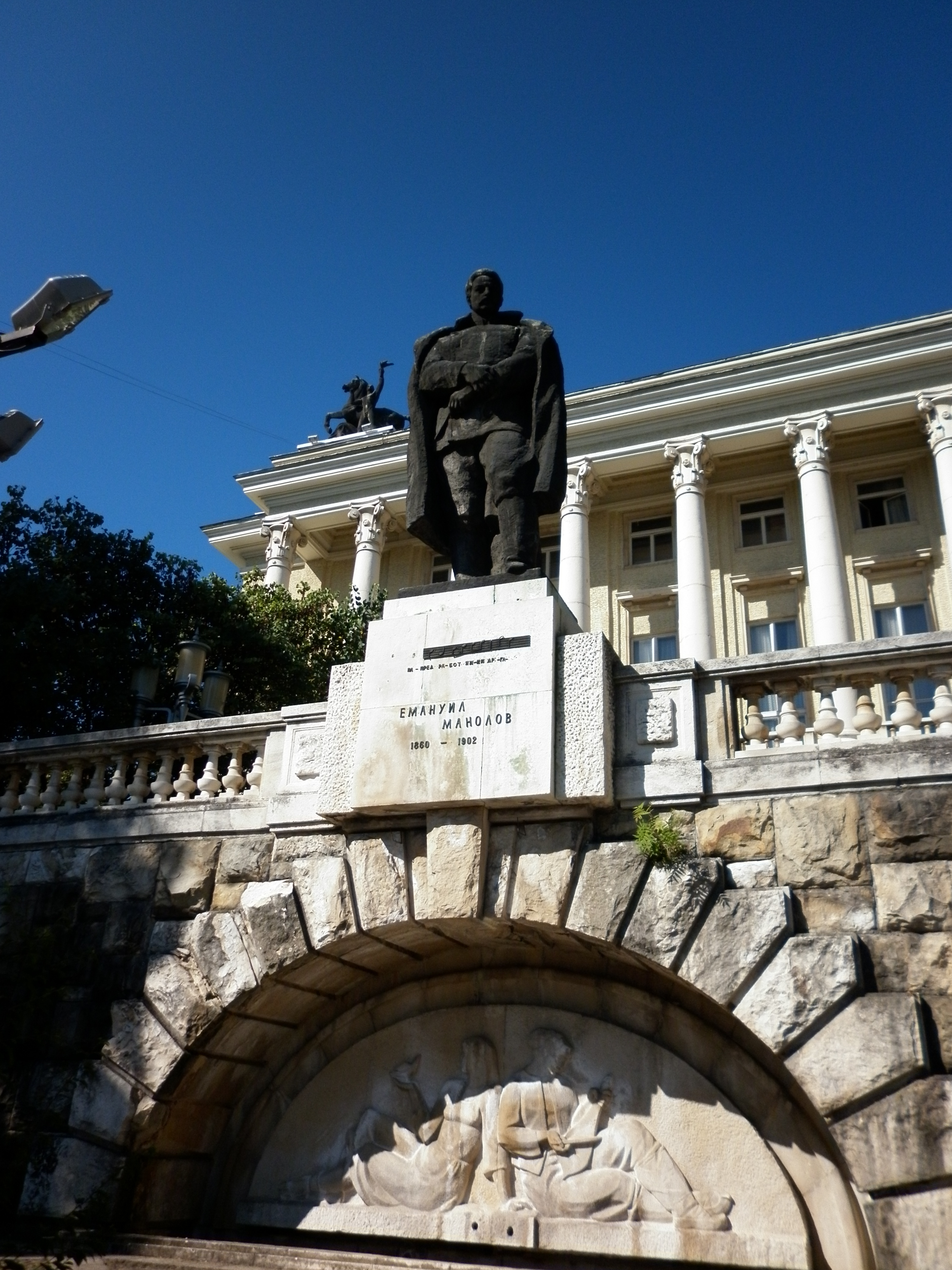 Паметник на Емануил Манолов пред Дома на Културата Габрово